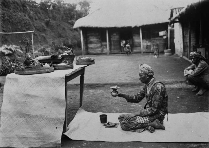 Foto. Hindoe priester op Tosari, Oost-Java